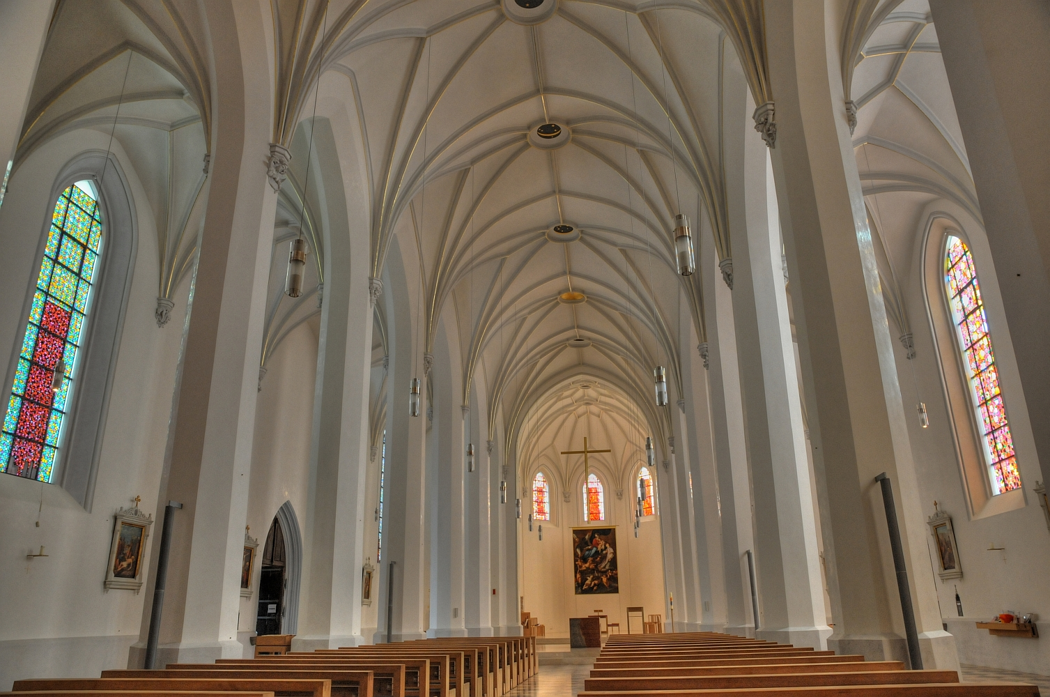 Innenaufnahme Kirche St. Nikolaus Rosenheim